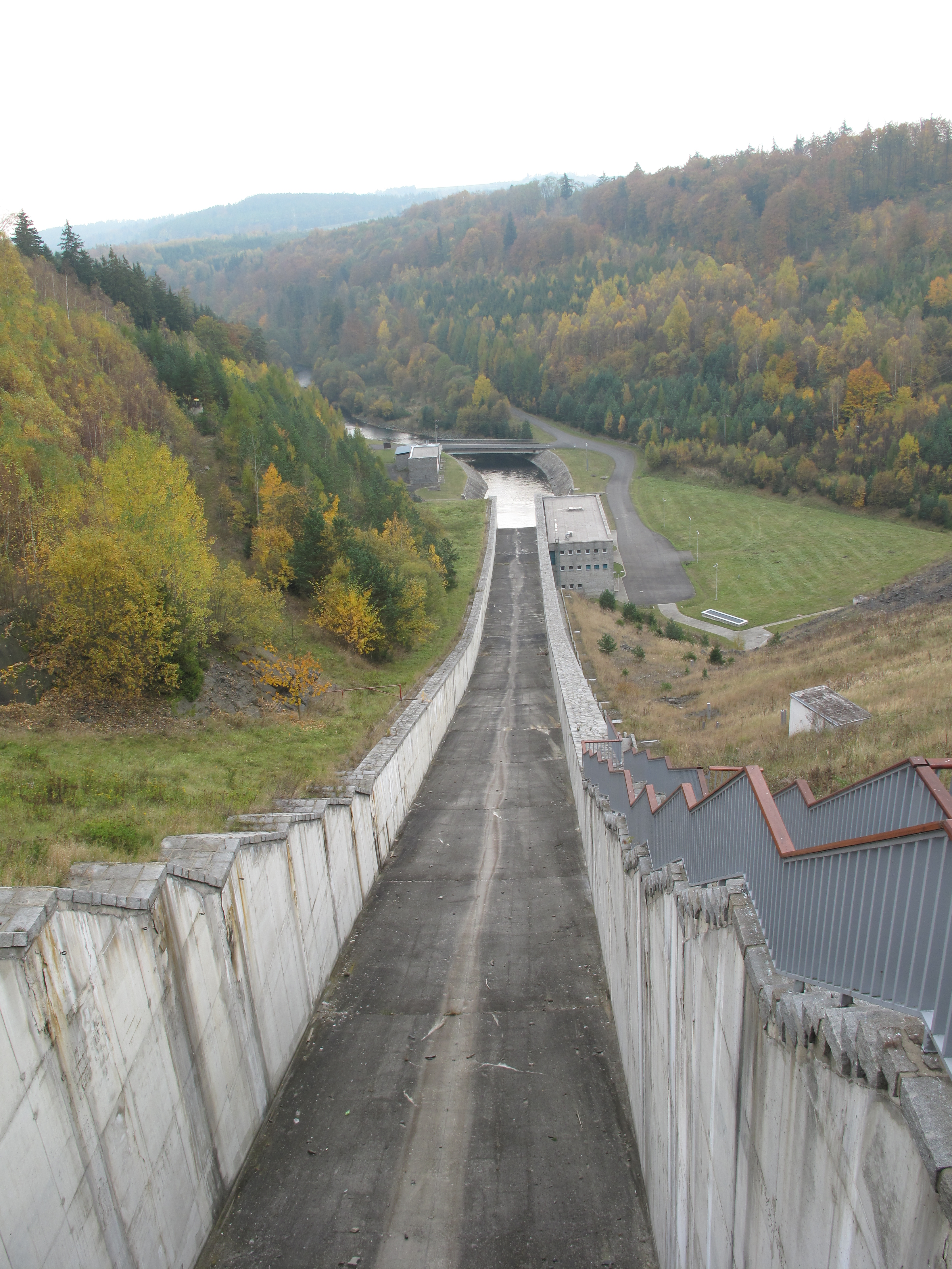 Vodní nádrž Slezská Harta. Okres Bruntál, Česká republika.